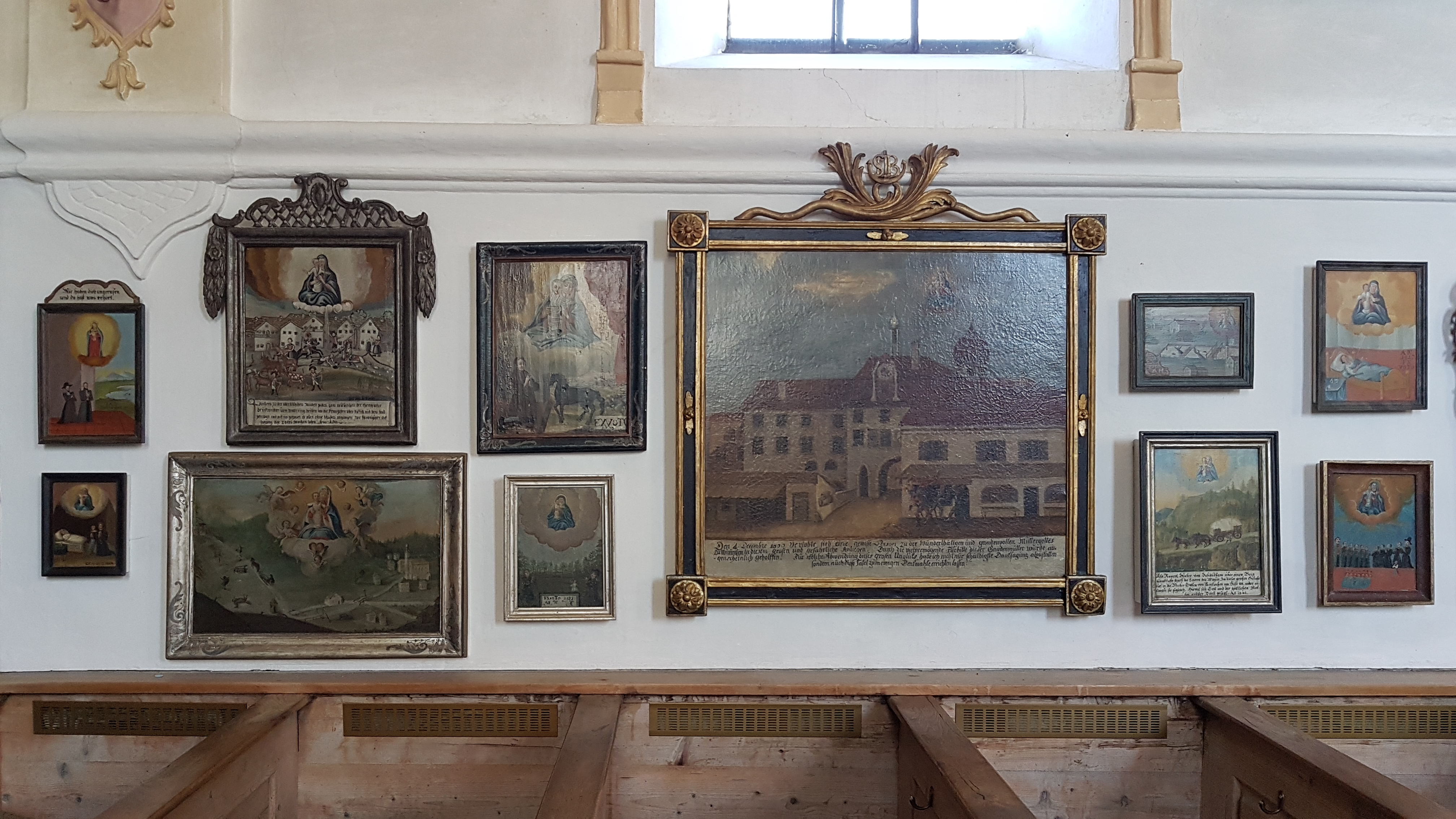 Maria Stern (Neukirchen am Simssee)